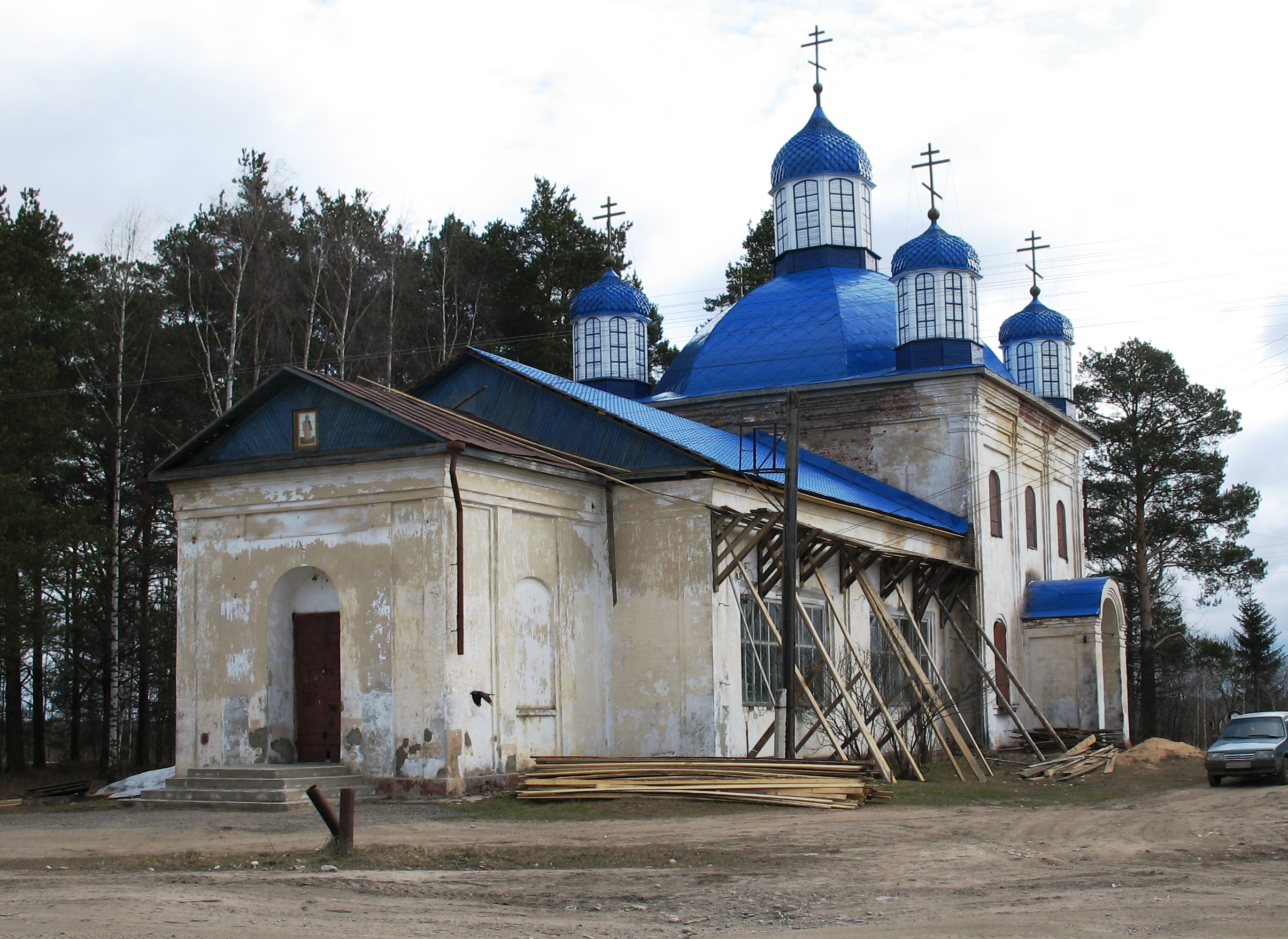 Церковь Илии Пророка в Судромском Погосте, Вельский район, Архангельская область